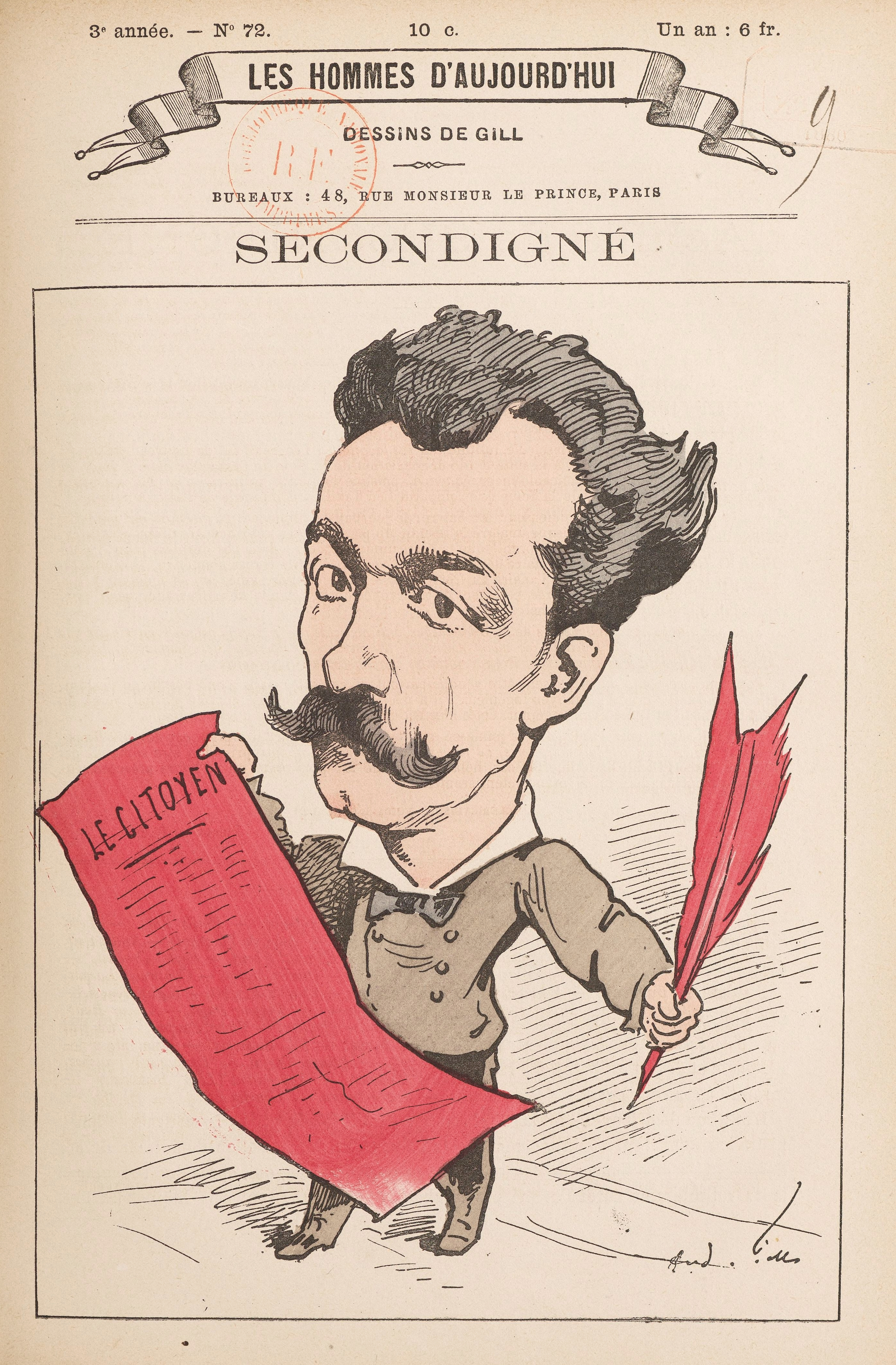 Achille-Henri BauBeau de Secondigné (1844-1904), caricature par André Gill, Les Hommes d'aujourd'hui, n°72, 1880